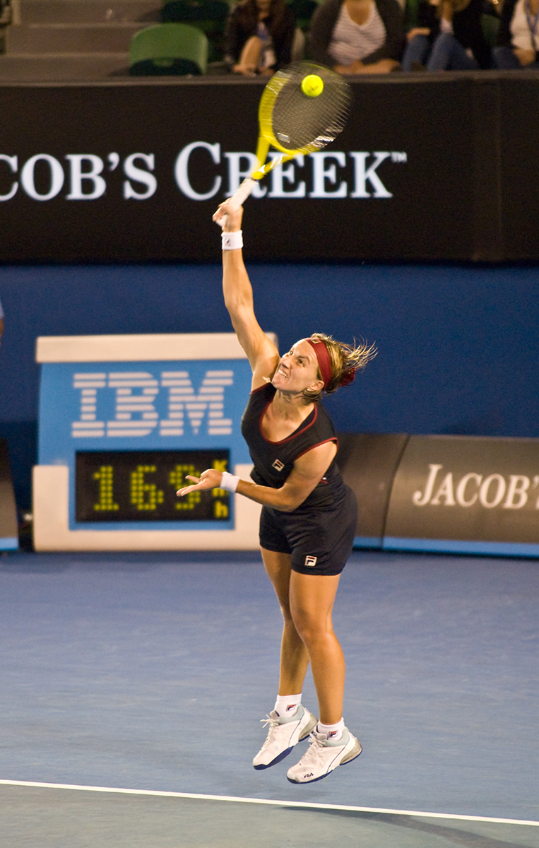 Svetlana Kuznetsova